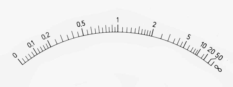 Párhuzamos kapcsolású ellenállásmérő skálája